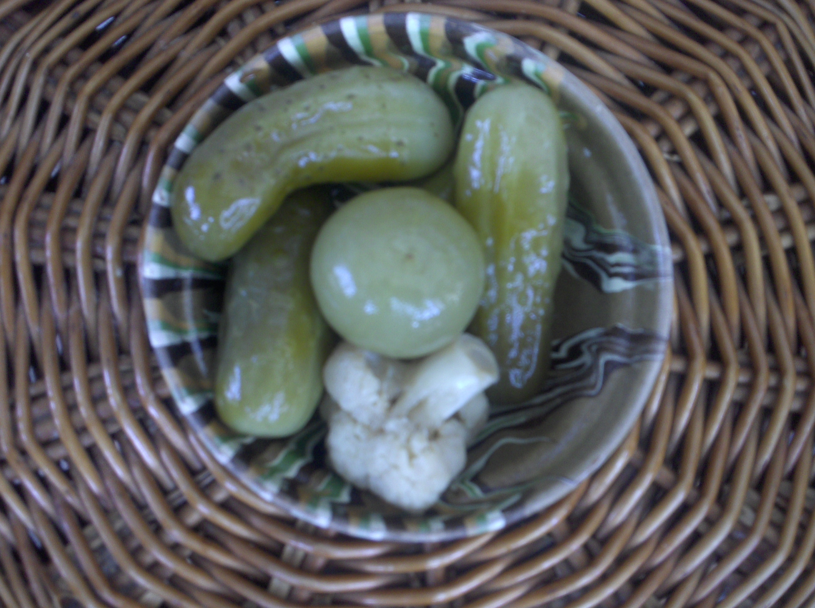 encurtidos